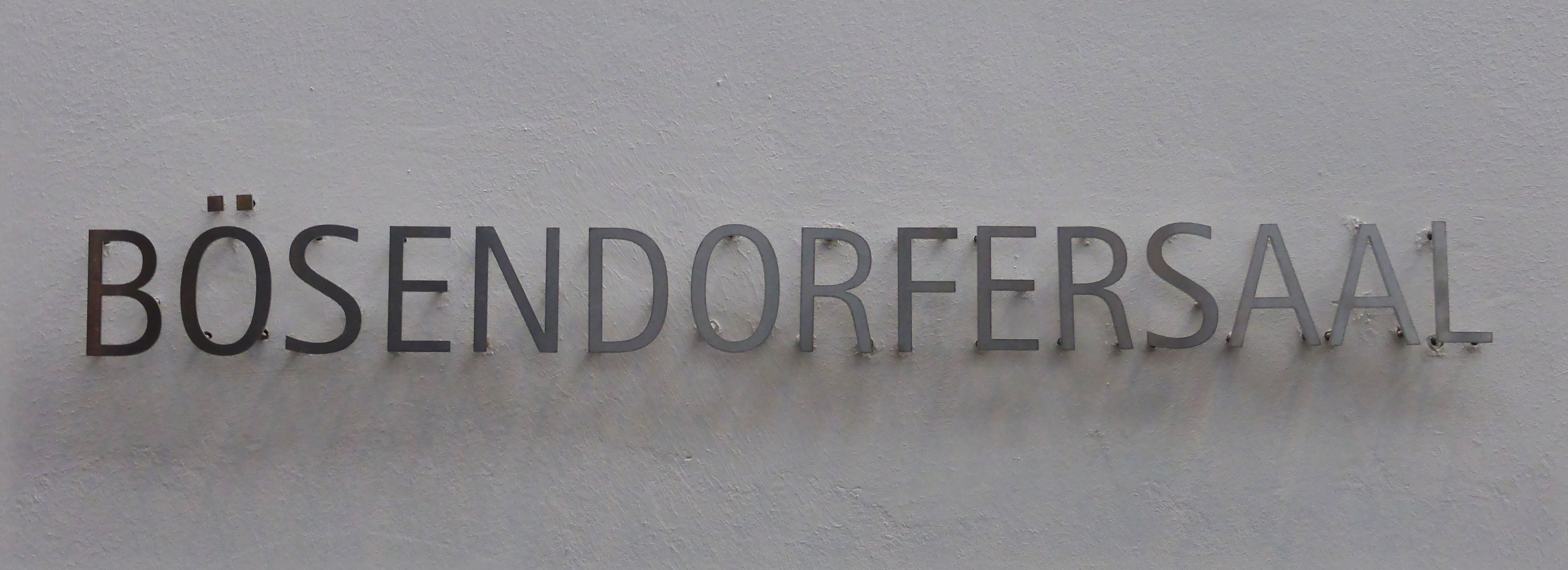 Neubau der Universität Mozarteum, Salzburg.